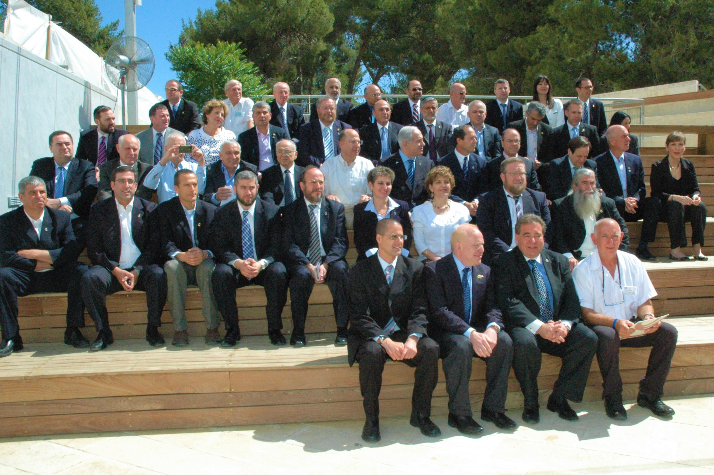 דוד הדרי במהלך ישיבת ממשלה חגיגית בגבעת התחמושת לרגל יום ירושלים תשע"ב. שורה 1 (עליונה): צבי האוזר, לאה נס, סטס מיסז'ניקוב, יוסי פלד, יצחק כהן, עוזי לנדאו, משולם נהרי, יהודה וינשטיין שורה 2: אורית נוקד ; גלעד ארדן ; משה כחלון ; יובל שטייניץ ; אלי ישי ; שאול מופז ; דניאל הרשקוביץ ; שלום שמחון ; סופה לנדבר ; יולי אדלשטיין ; אריאל אטיאס שורה 3: לימור לבנת ; מתן וילנאי ; דן מרידור ; סילבן שלום ; ניר ברקת ; בנימין נתניהו ; משה יעלון ; יעקב נאמן; יצחק אהרונוביץ' ; זאב בנימין בגין ; מיכאל איתן ; ישראל כ"ץ ; שורה 4: פפה אללו ; יצחק פינדרוס ; יעל ענתבי ; ראש הסגל של מועצת עיריית ירושלים ; ? ; ישראל קלרמן ; ? ; דוד הדרי ; קובי כחלון שורה 5: ? ; ? ; אלישע פלג ; ?